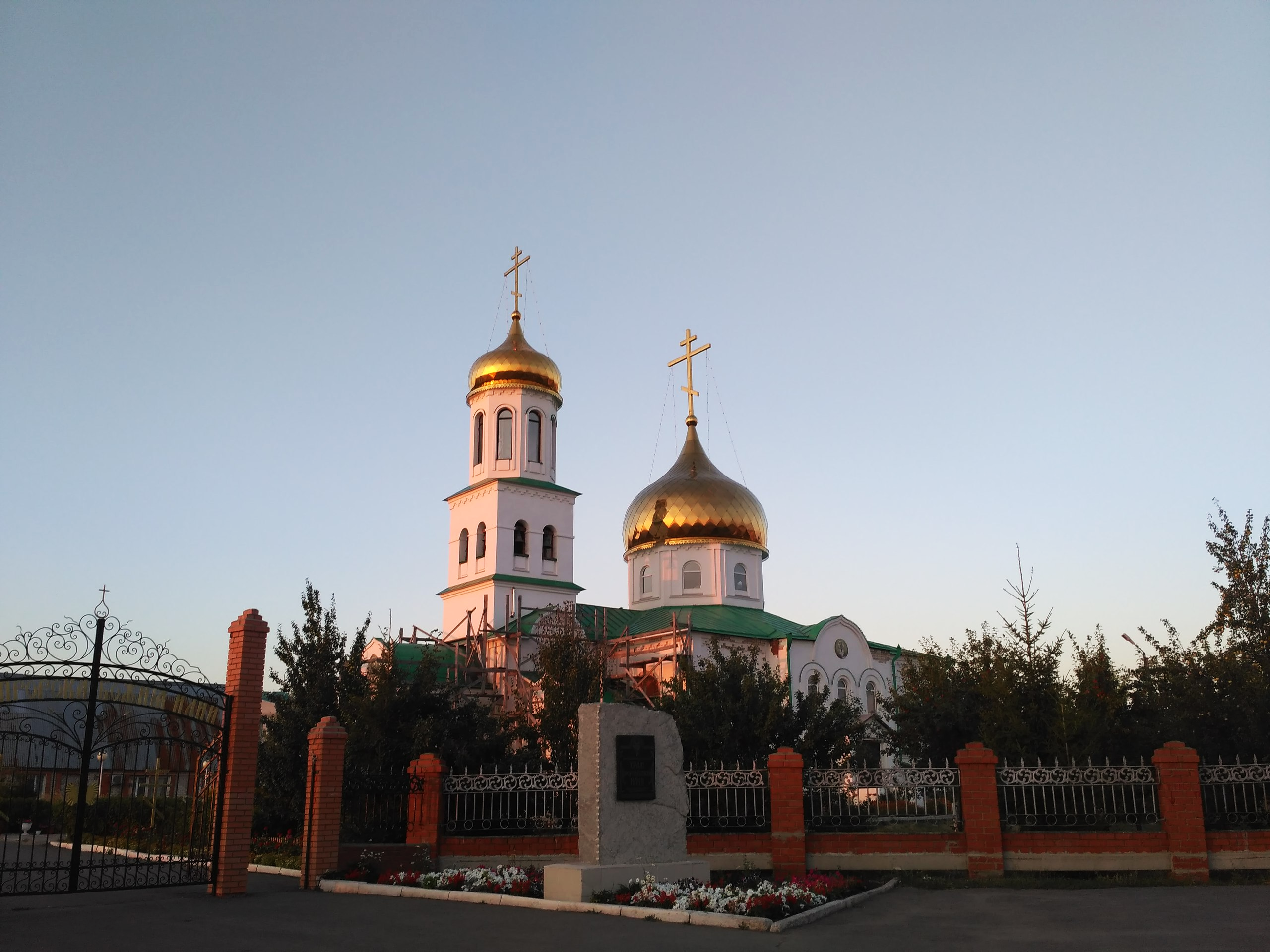 Церковь Илии Пророка в Нурлате